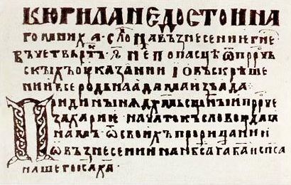 Першая старонка «Слова на ўзнясенне Гасподняе» Кірылы Тураўскага паводле спісу XIII ст.